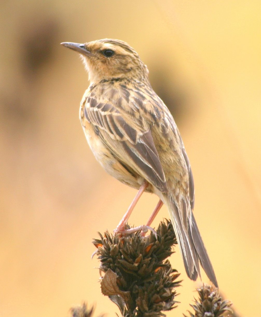 Photographed by Nishad H. Kaippally. Nilgir Pipit (Anthus nilghiriensis) 18-Apr-2007 12:12:32 PM . Canon EOS 400 Sigma 400mm